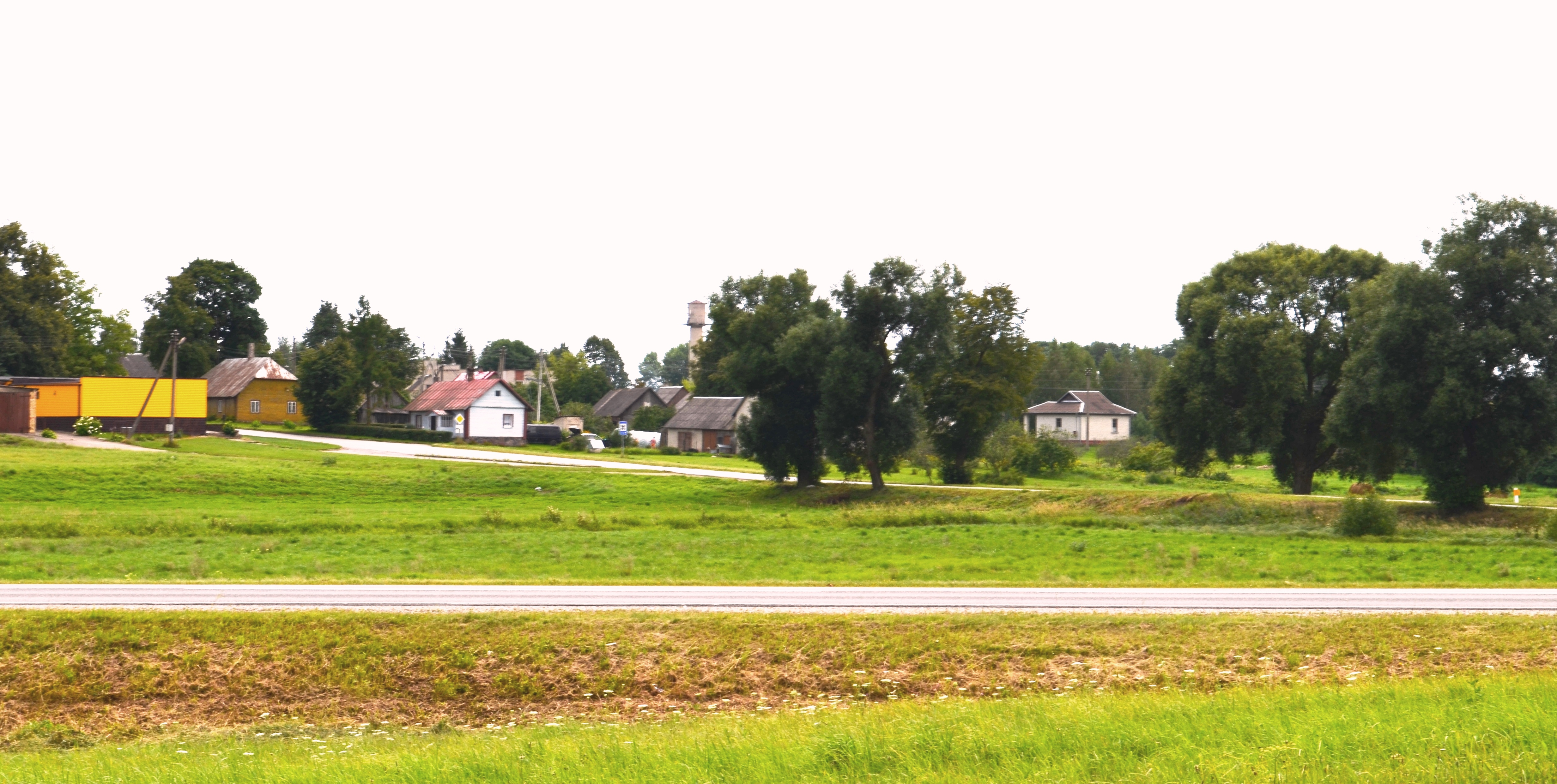 Upytė, Panevėžio raj.